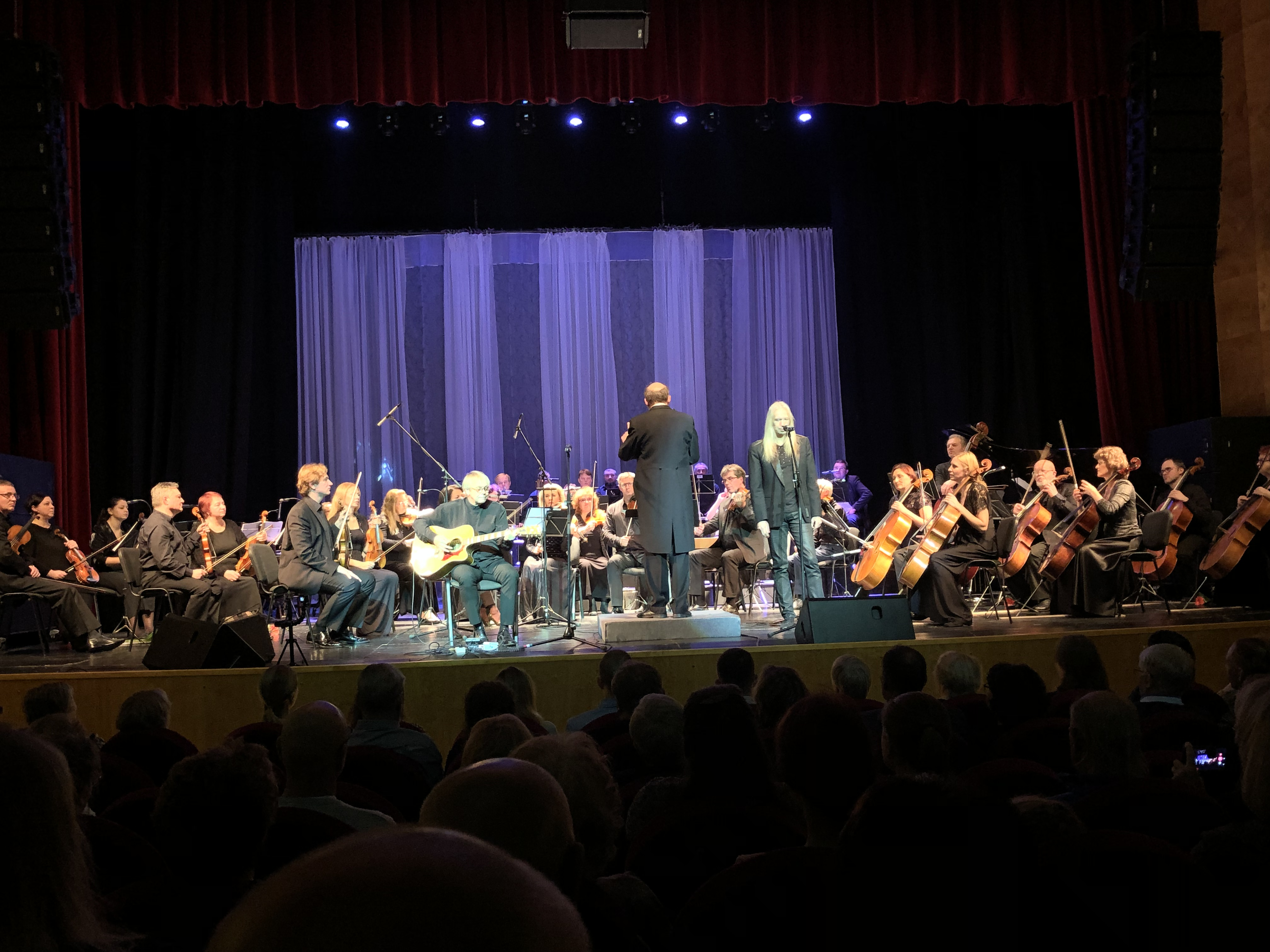 Нарвский Симфонический оркестр и эстонские рокеры Jaanus Nõgisto и Indrek Patte